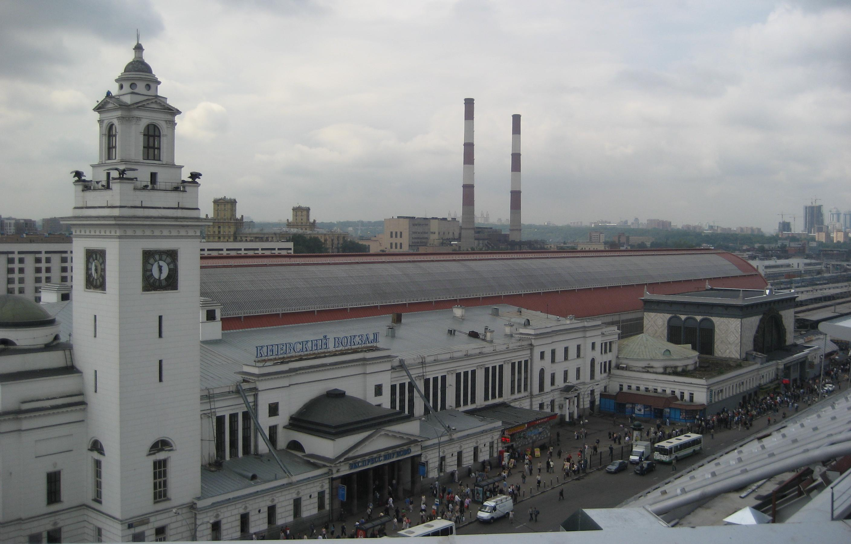 Киевский вокзал. Внешний вид дебаркадера